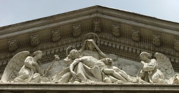 Representación escultórica de la piedad, en el exterior de la iglesia Nuestra Señora de la Piedad, ciudad de Buenos Aires, Argentina. Se aprecia la influencia del clasicismo en el arte cristiano contemporáneo desarrollado en América del Sur.